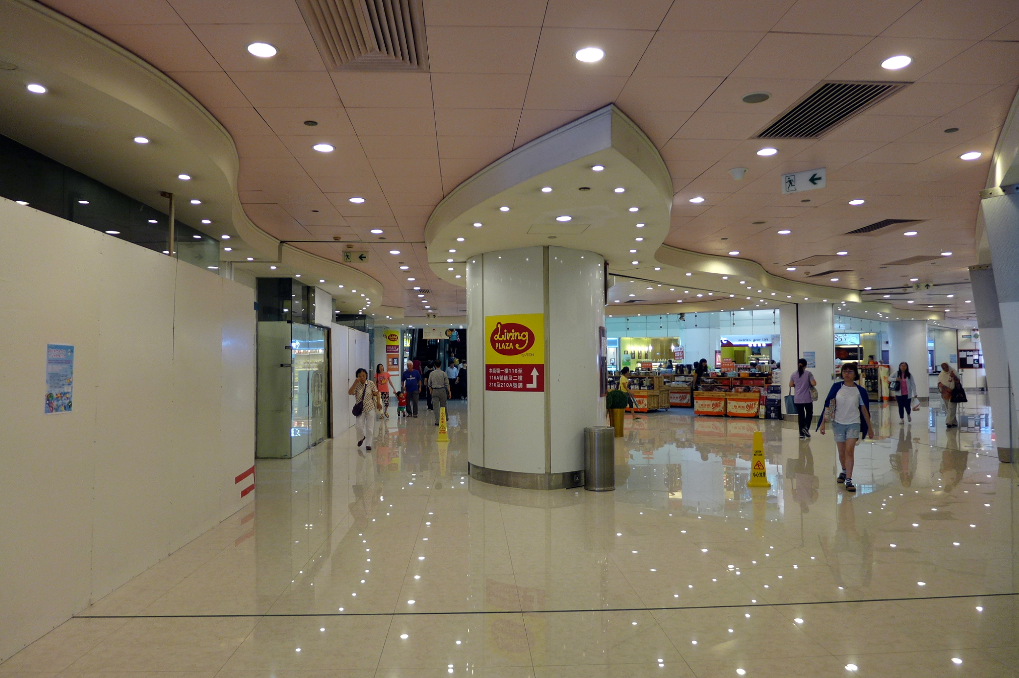 Marina Square West Outside view